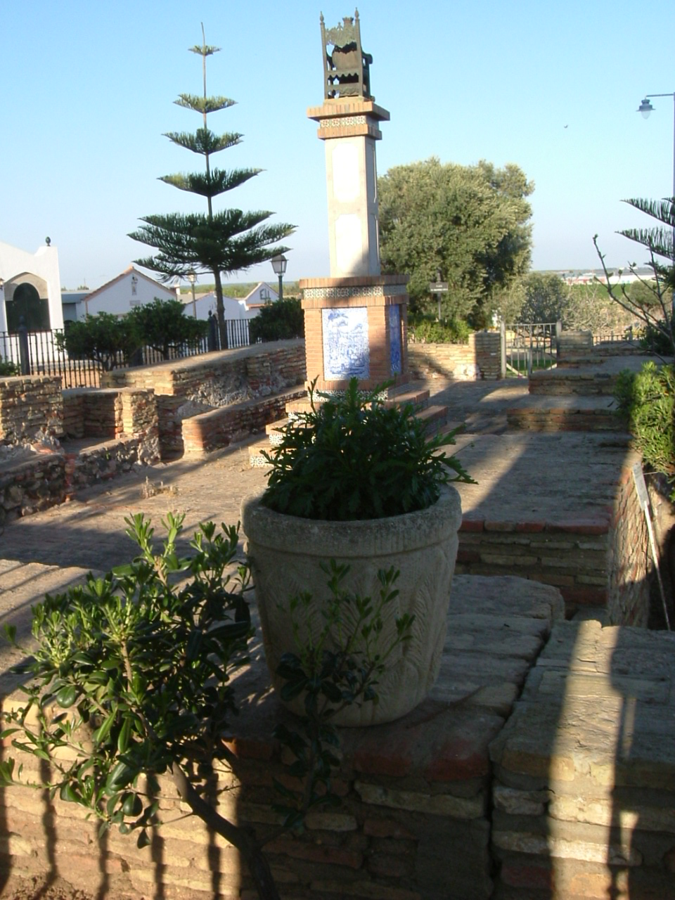 Ruinas del antiguo convento franciscano de Nuestra Señora de la Bella